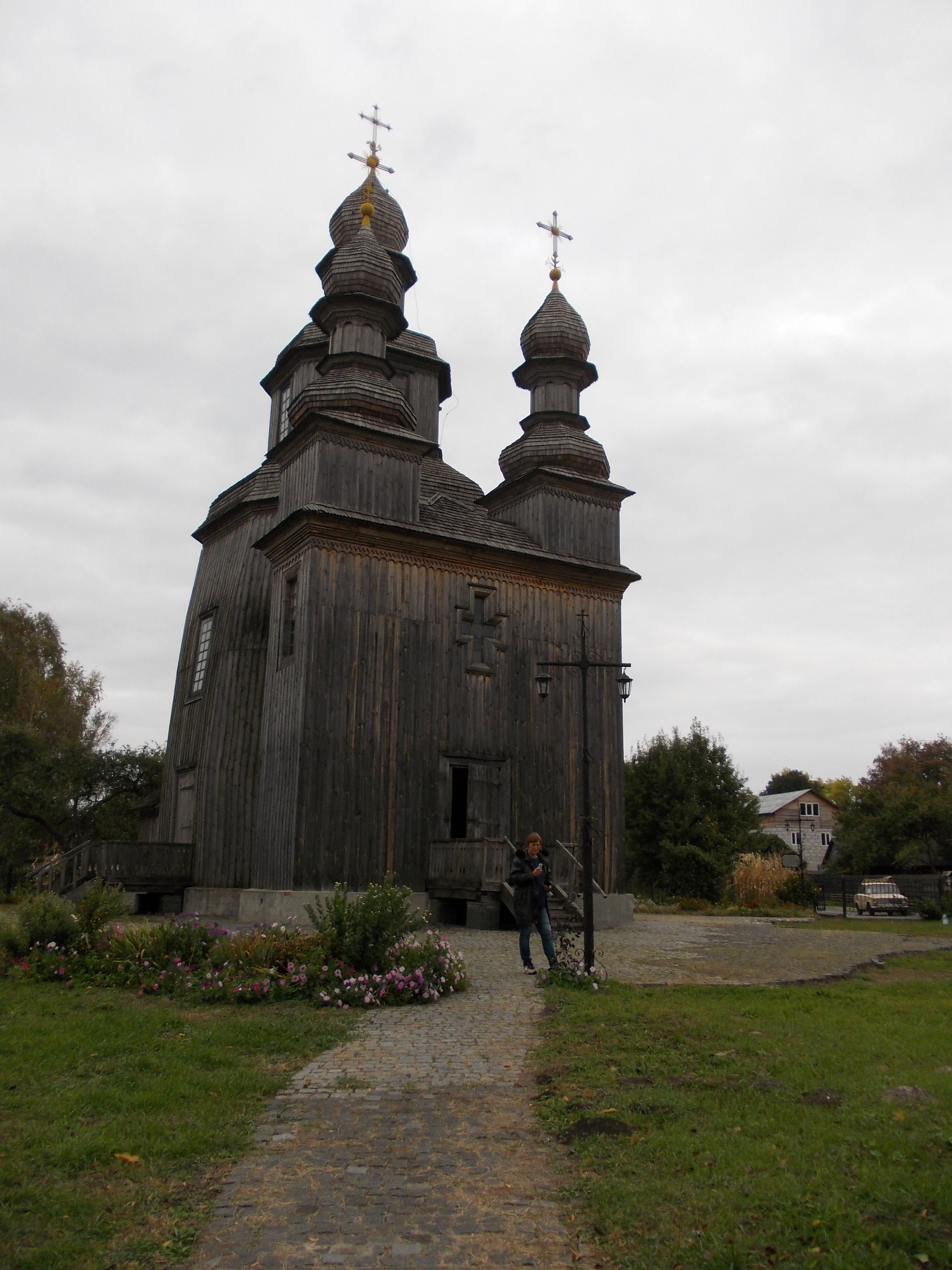 Городище літописного міста Сновська , Седнів